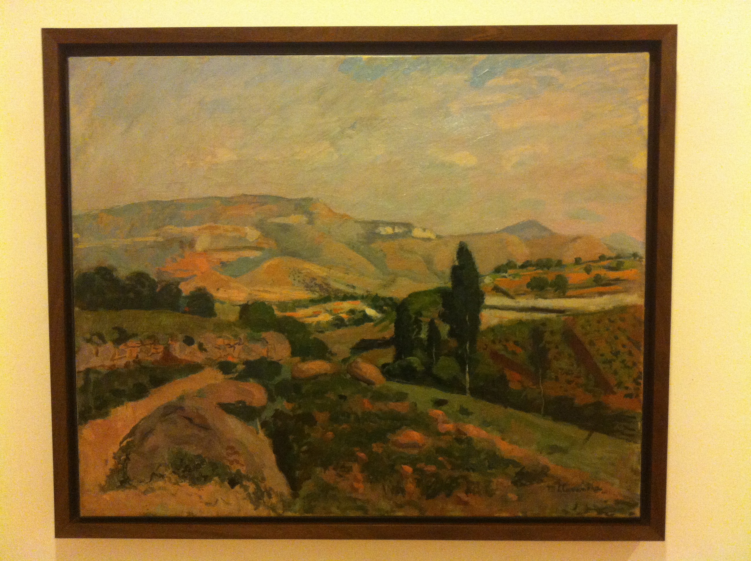 Obra exposada a l'Exposició Del Realisme al Noucentisme Collecció Banc Sabadell, al Museu d'Art de Sabadell. L'exposició va ser itinerant i també es va fer a diversos museus de Catalunya, amb petites variacions en la col·lecció. L'obra forma part del fons d'art del Fons d'Art del Banc Sabadell